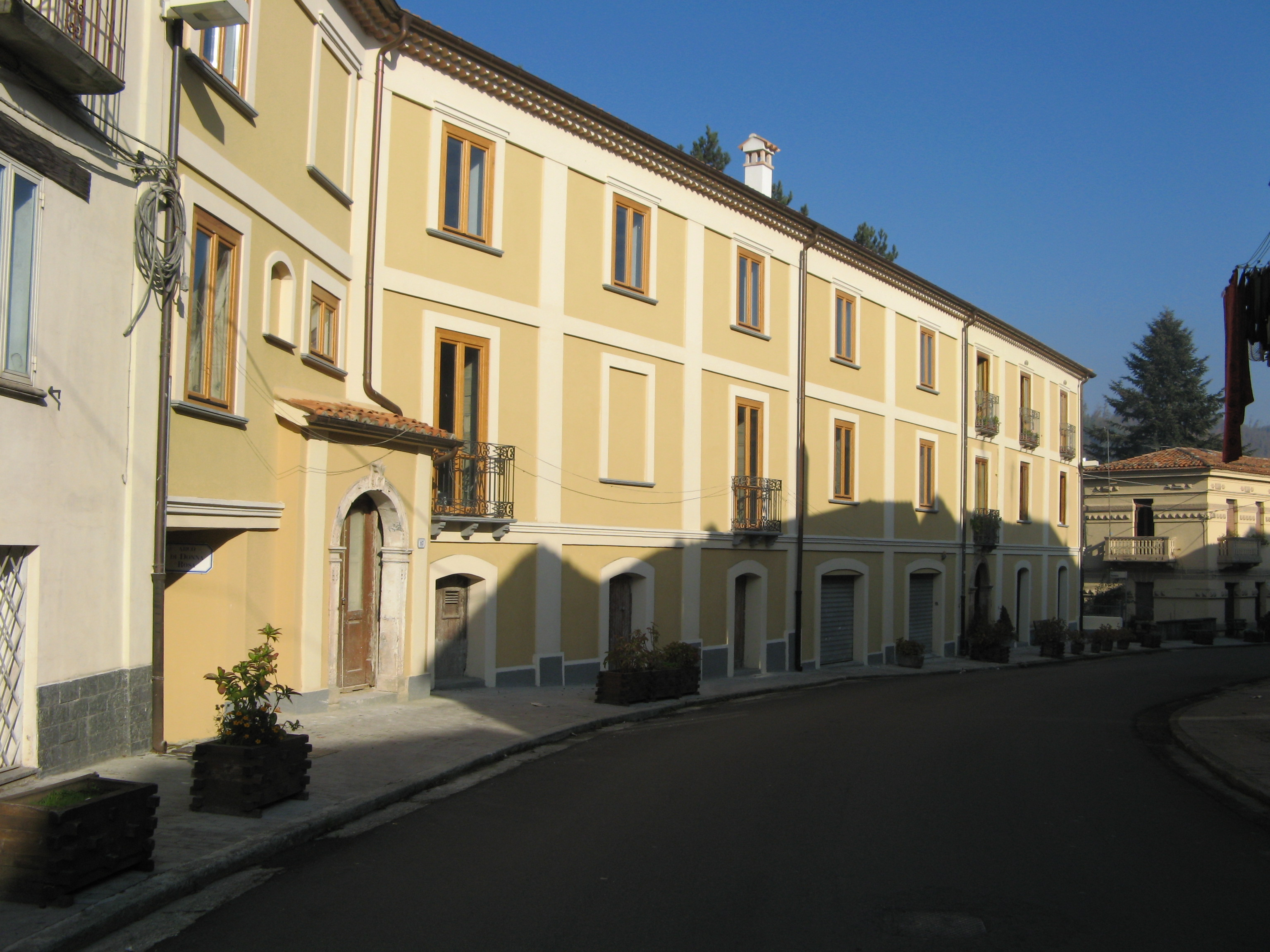 Soveria Mannelli: Scorcio del Centro storico (quartiere "Porta Piana"; arco di Donna Rosa; Palazzo Caligiuri)